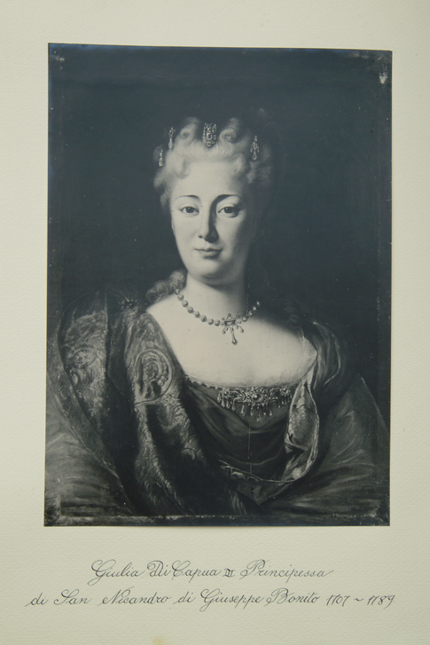 moglie di Domenico Cattaneo, cui il principe dedica la villa, denominata "casino di delizia del principe di San Nicandro"